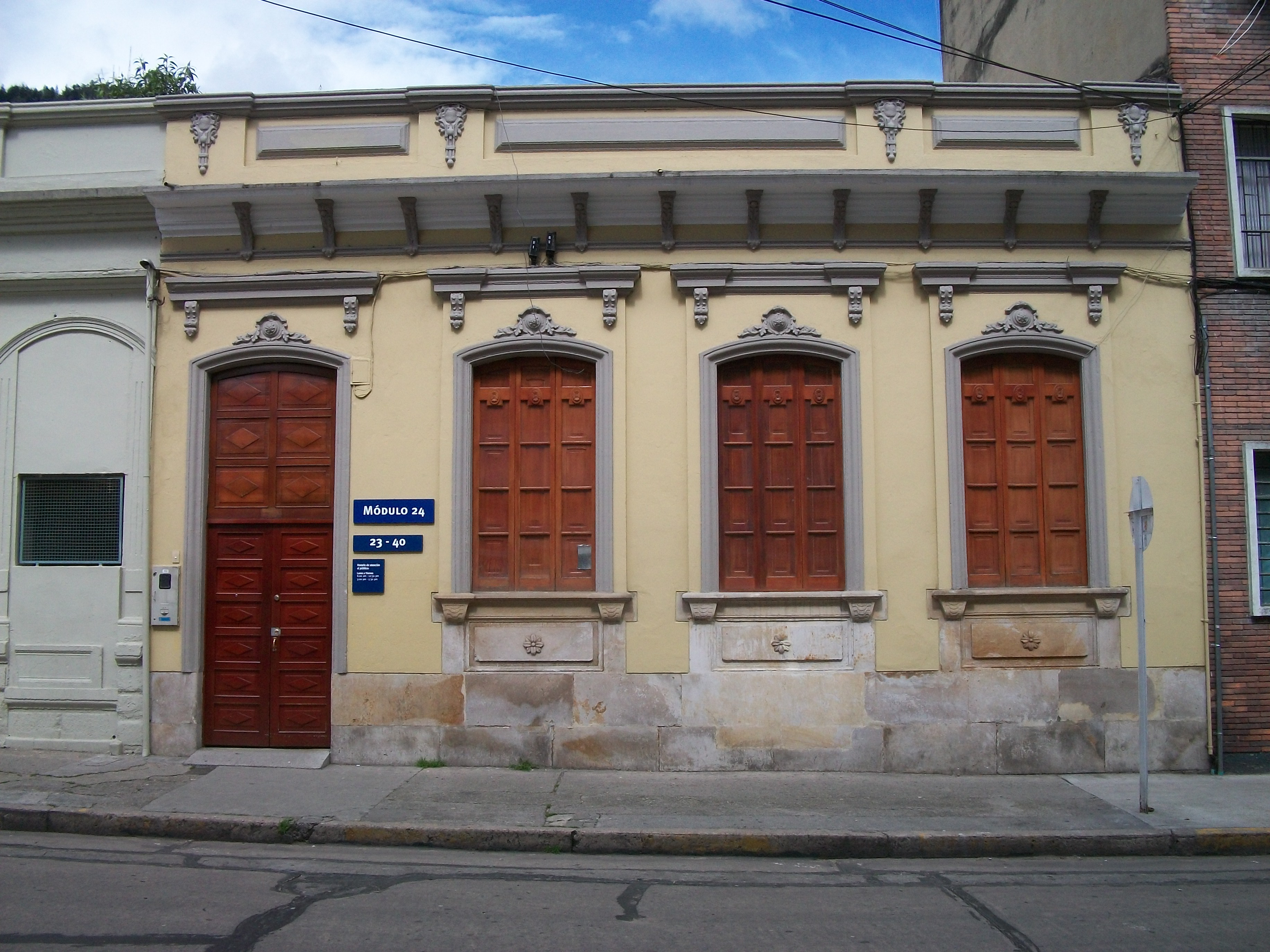 Módulo 24, carrera 4A calle 24. UJTL - barrio Las nieves.